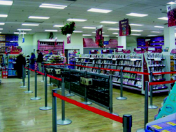 Tensabarrier